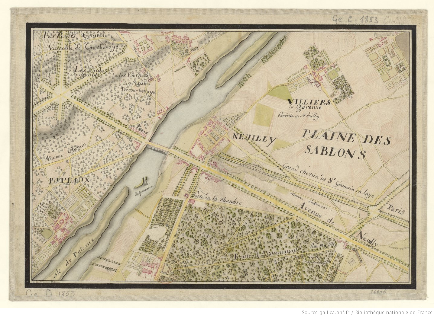 Date d'édition : 1800 Sujet : Neuilly-sur-Seine -- Environs Type : document cartographique,document cartographique manuscrit,image fixe gallica